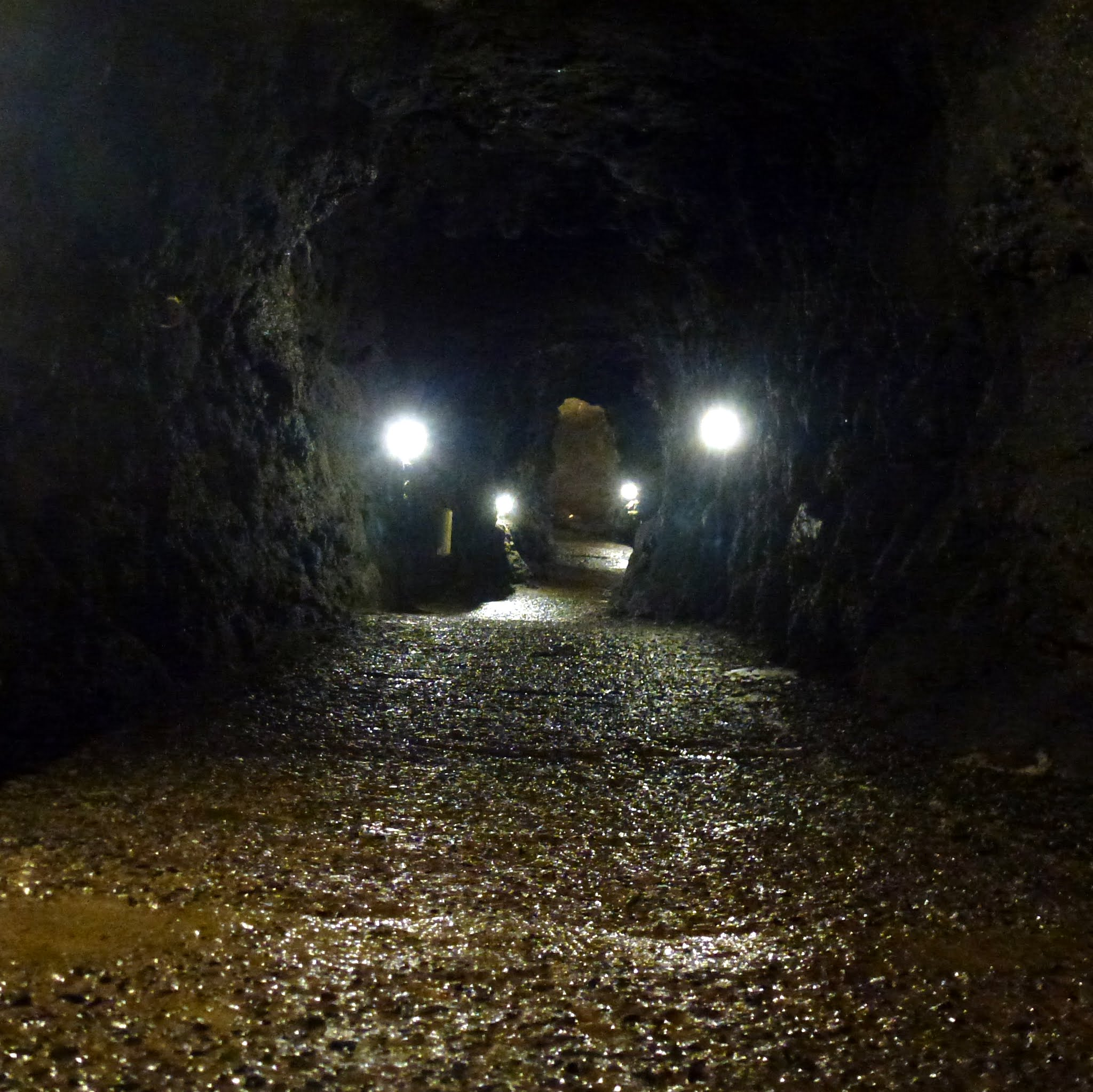 Sao Vicente Volcanic Caves, Sitio Pe do Passo, Madeira, Portugal